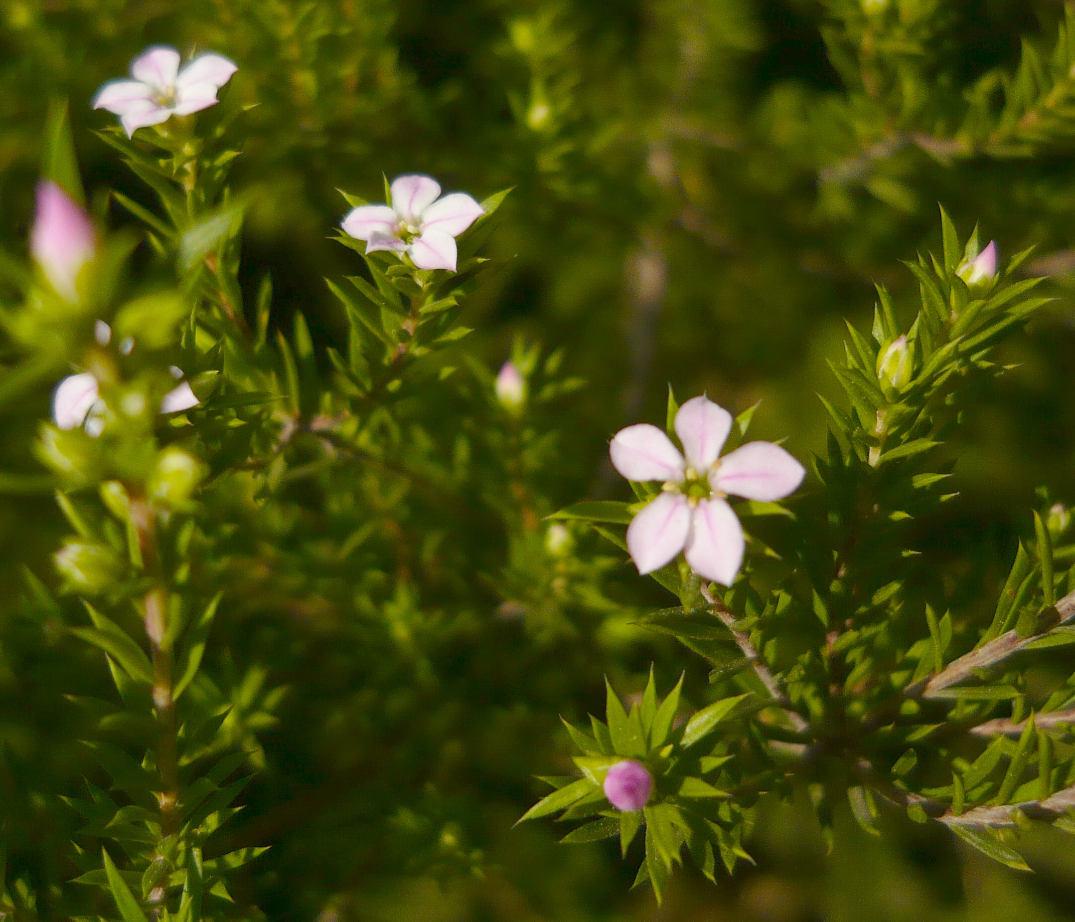 Diosma ericoides. Real Jardín Botánico de Madrid.